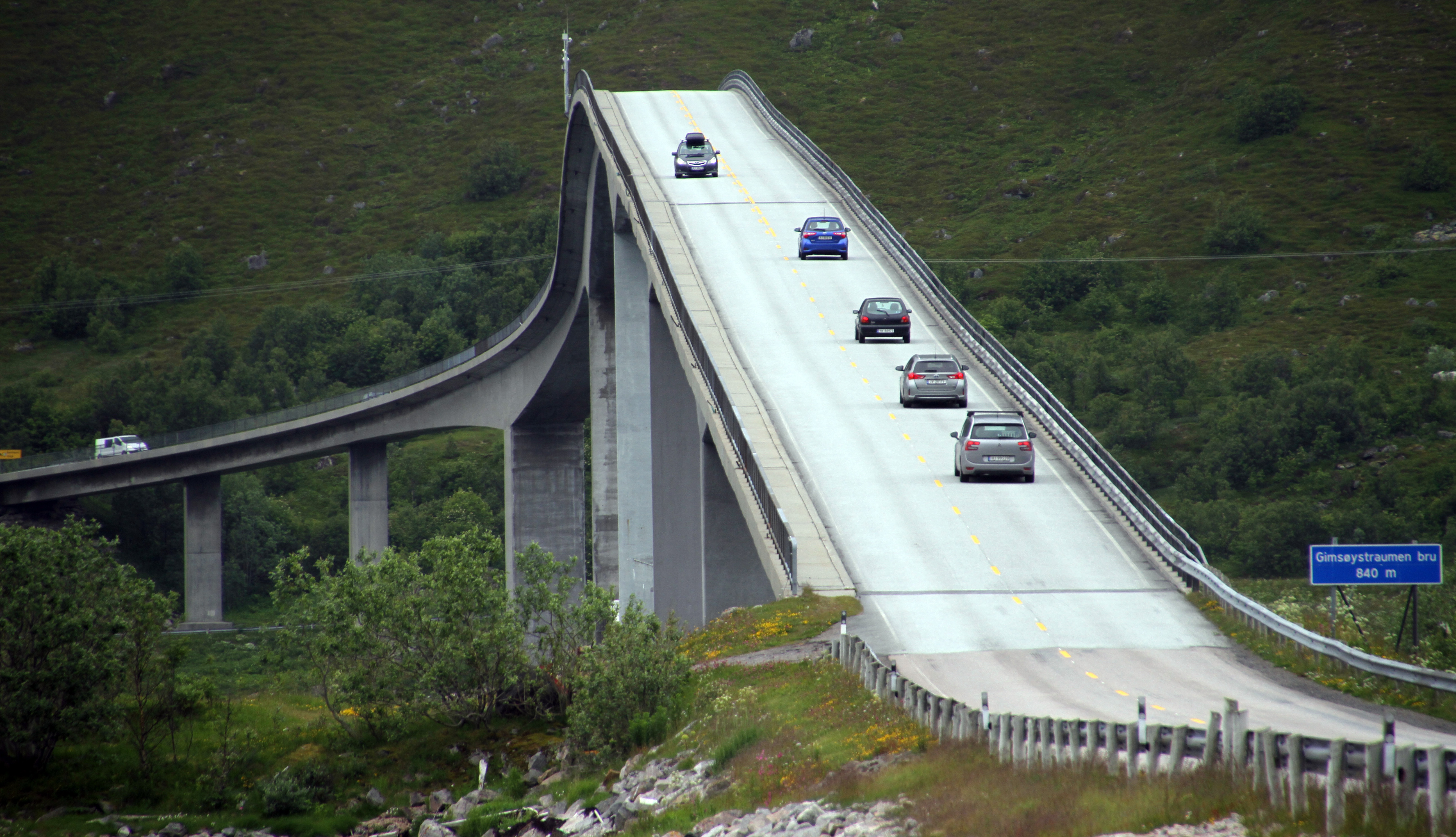 Gimsøystraumen-Bruecke zwischen Austvågøy und Gimsøy (Lofoten, Norwegen)